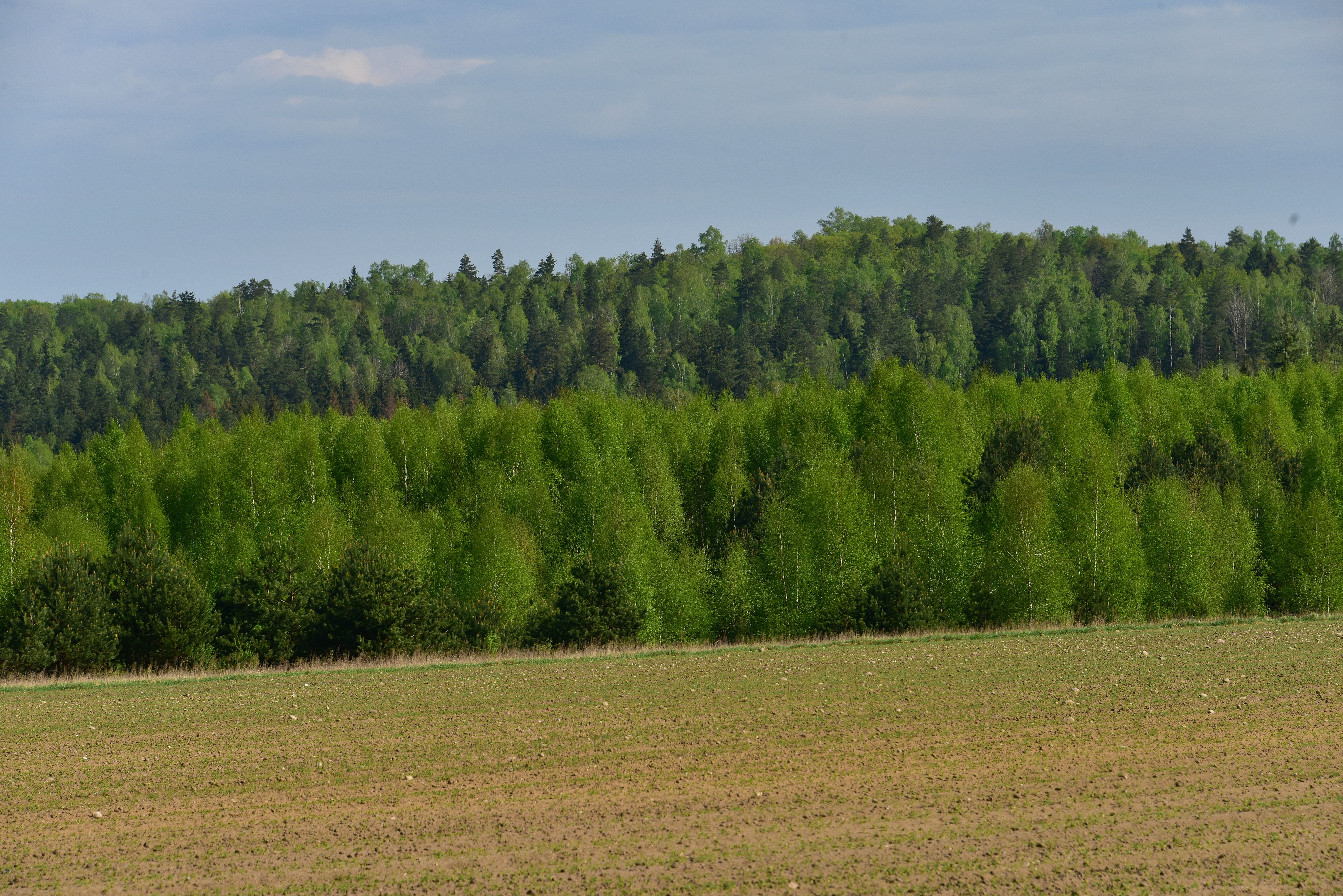 Park Krajobrazowy Puszczy Knyszyńskiej w okolicy Kołodna